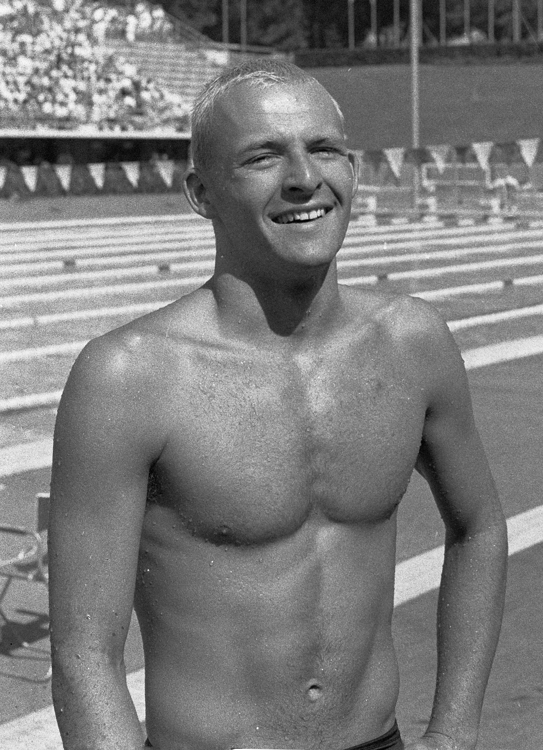 Olympische Spelen te Rome, Amerikaan Larson, zilveren medaille 100 meter vrije slag. Location: Italië, Rome